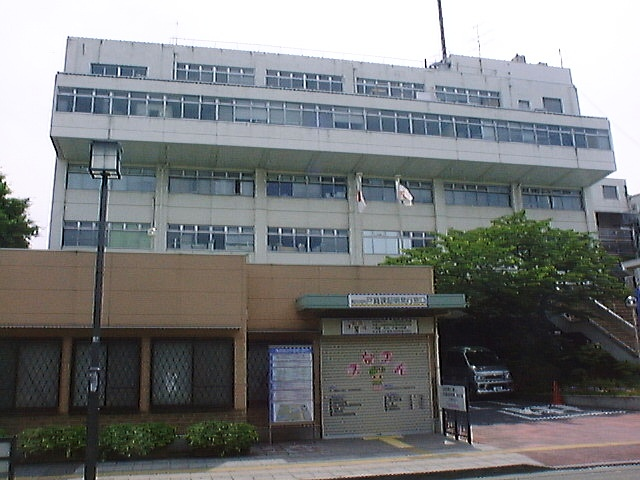 Old Minami-ku Ward Office, Minami-ku, Yokohama, Kanagawa, Japan (南区役所)